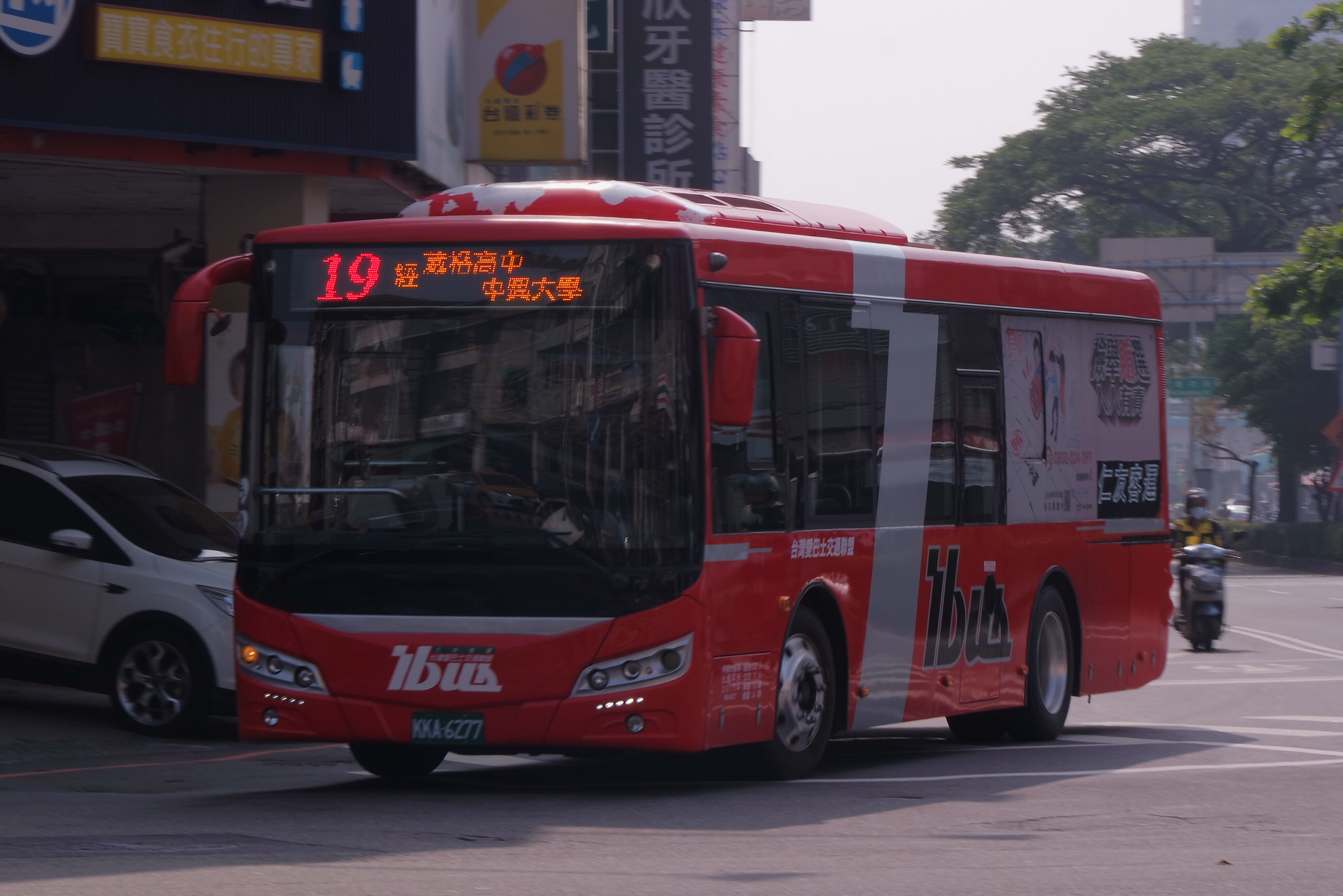 台中市仁友客運(KKA-6277)